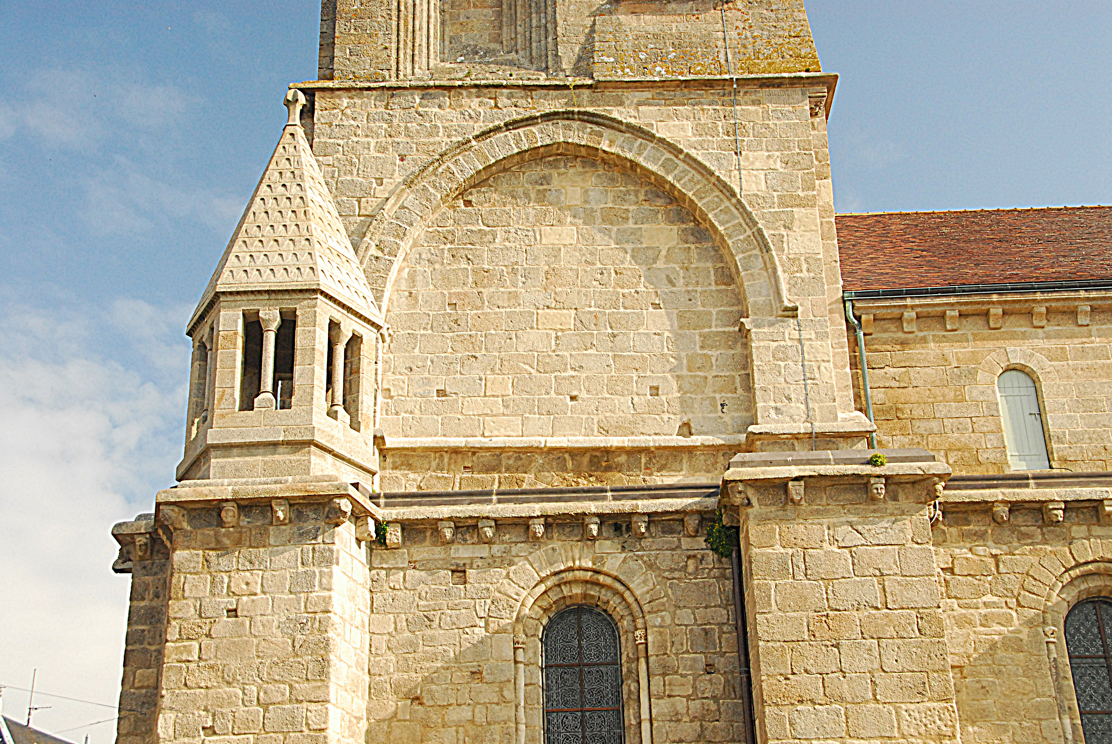 N.-D. de La Souterraine, Turmsockel von S